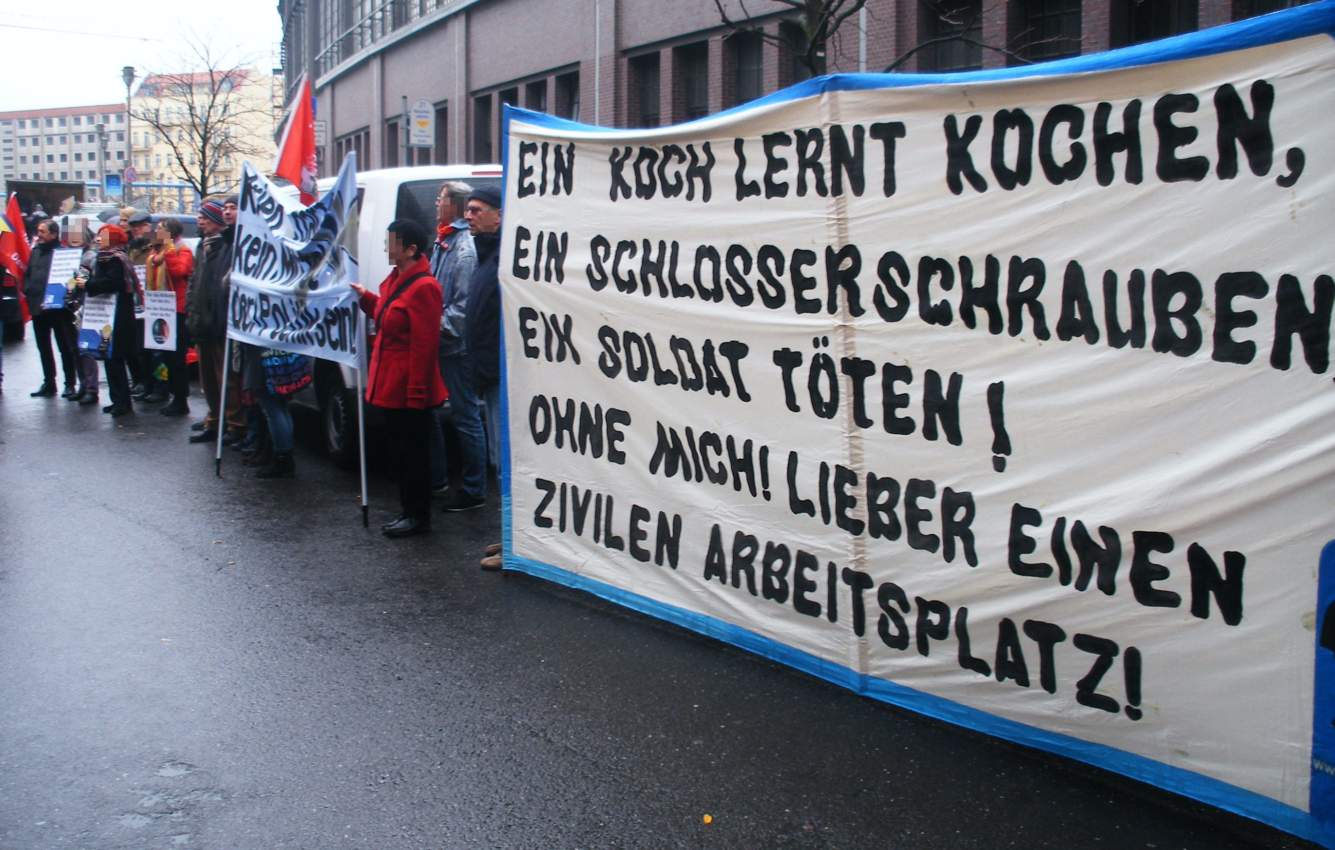 Proteste zur Eröffnung des Bundeswehr Showrooms in Berlin mit der Verteidigungsministerin